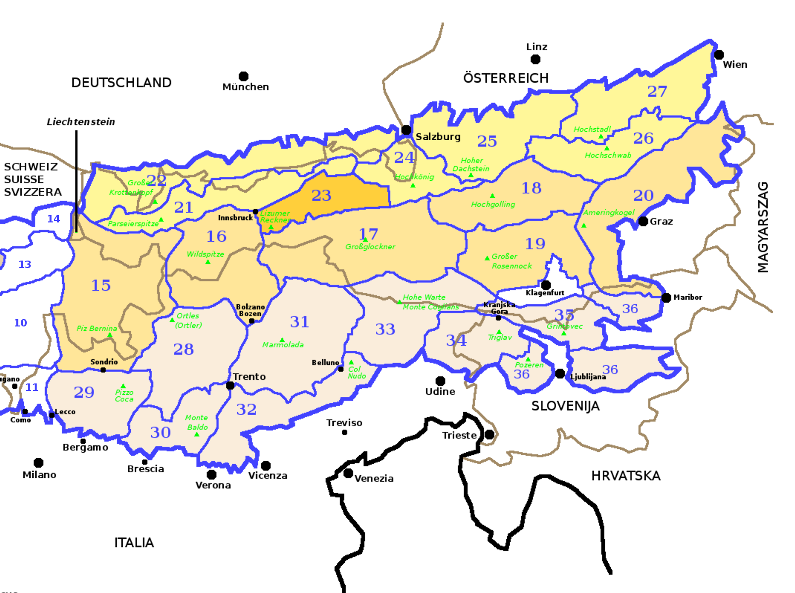 Alpi Orientali secondo la SOIUSA con evidenziate le Alpi Scistose Tirolesi